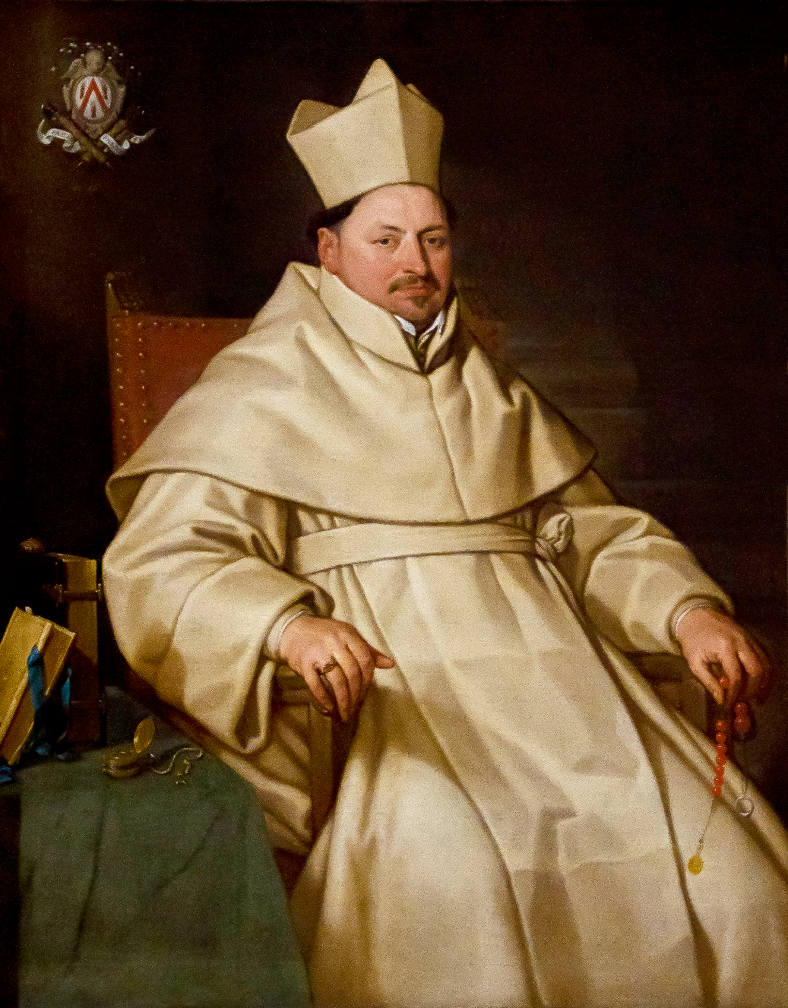 Portret van abt Nicolaas Mutsaerts (1645) van de abdij van Tongerlolabel QS:Lnl,"Portret van abt Nicolaas Mutsaerts (1645) van de abdij van Tongerlo"